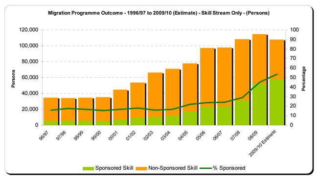 Иммиграция в Австралию (спонсируемая и иная)